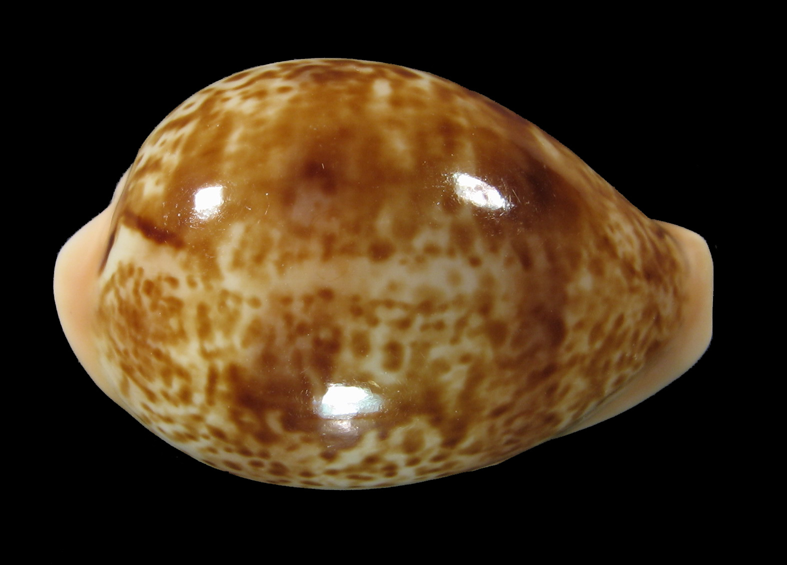 photo de Cypraea achatidae inopinata